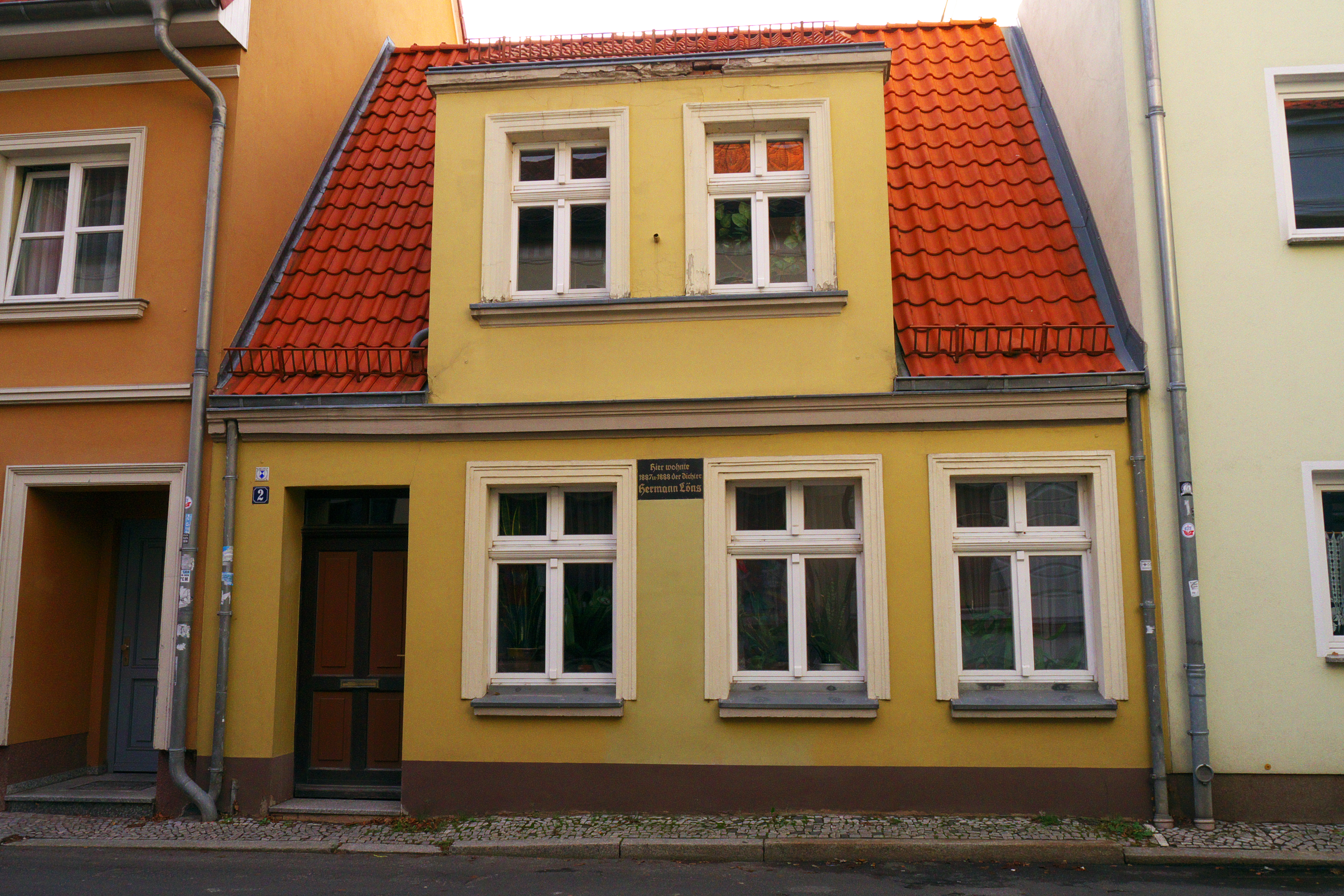 Das Wohnhaus Löns während seiner Studienzeit in Greifswald